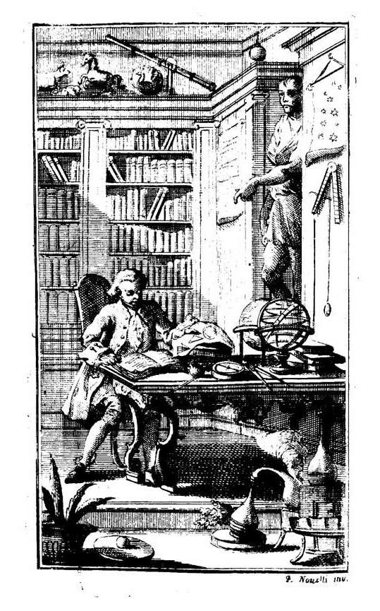 Lettere filosofiche del signor di Maupertuis. Traduzione dal francese di Orazio Arrighi-Landini fra gli Agiati Dorinio. - In Venezia : presso Antonio Zatta, 1760. - XXIV, 184 p., [1] c. di tav. : antiporta calcografica ; 8°. - Antiporta disegnata da Pietro Antonio Novelli. .